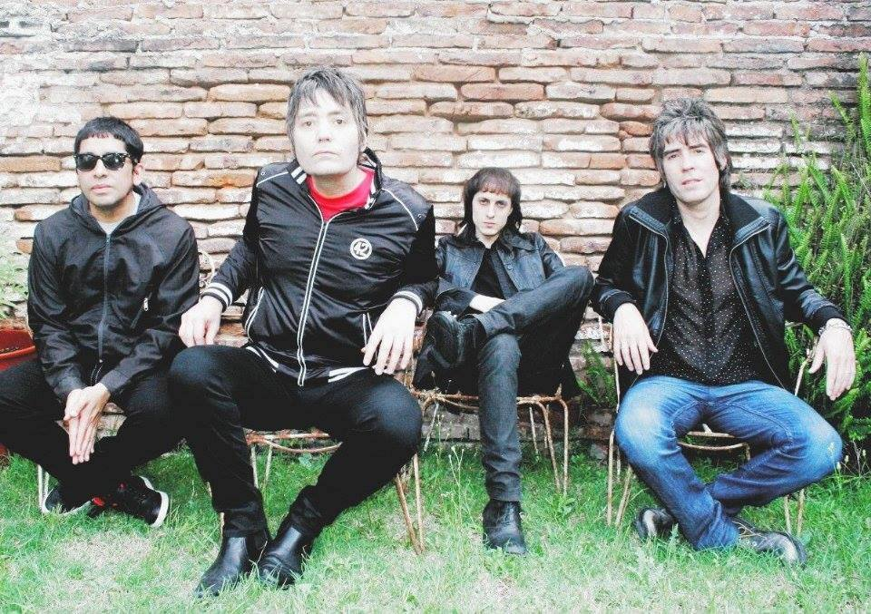 Foto nueva de JUANA LA LOCA